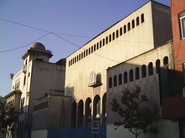 Gran Sinagoga Santiago de Chile